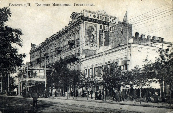 Гостиница "Большая Московская" на старой открытке. Ростов-на-Дону.